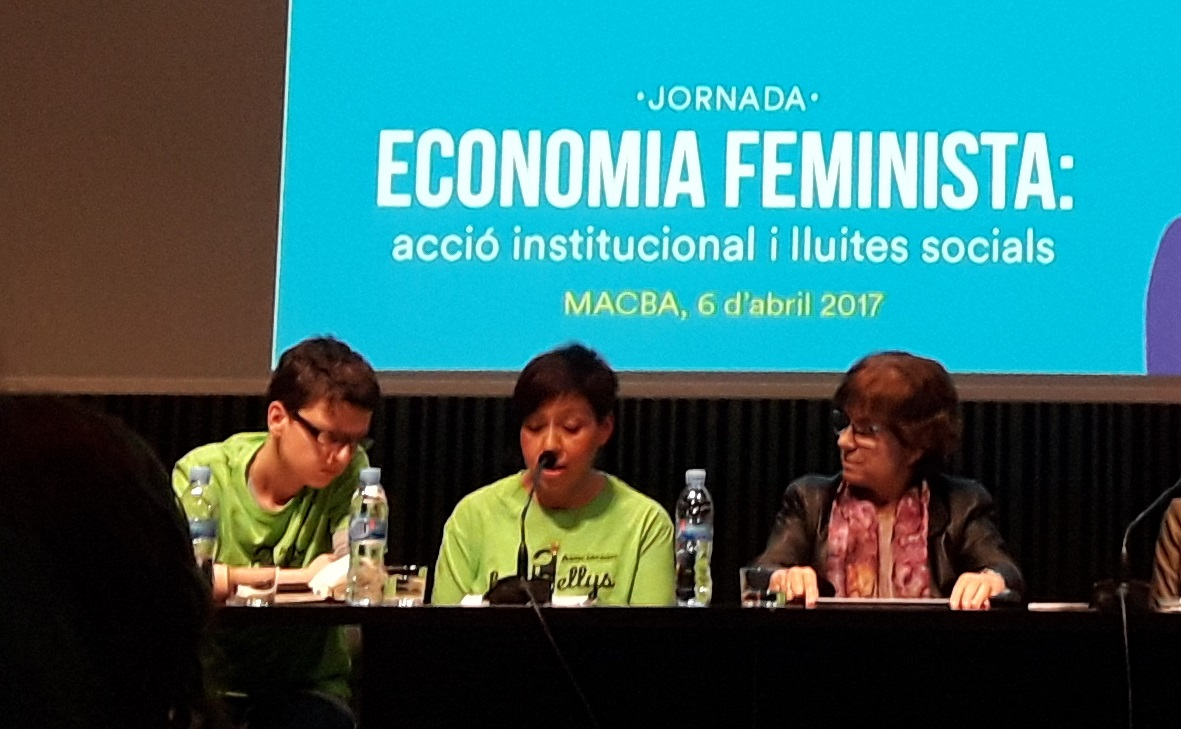 Con camisetas verdes, dos miembros de la asociación "Las Kellys", de camareras de hotel, junto con Joana Amat, la presidenta de FIDEM. Jornada de economía feminista organizada por el ayuntamiento de Barcelona, en el MACBA, jueves 6 de abril de 2017.